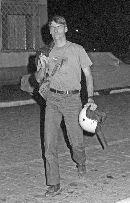 Rio de Janeiro (RJ) - 04/08/1986 EXCLUSIVO POLITICA Jair Bolsonaro (capitão) - Bolsonaro, candidato à vereador pelo Partido Democrata Cristão (PDC) - Foto Luiz Pinto / Agência O Globo /PAGOS- Negativo: 88-15186